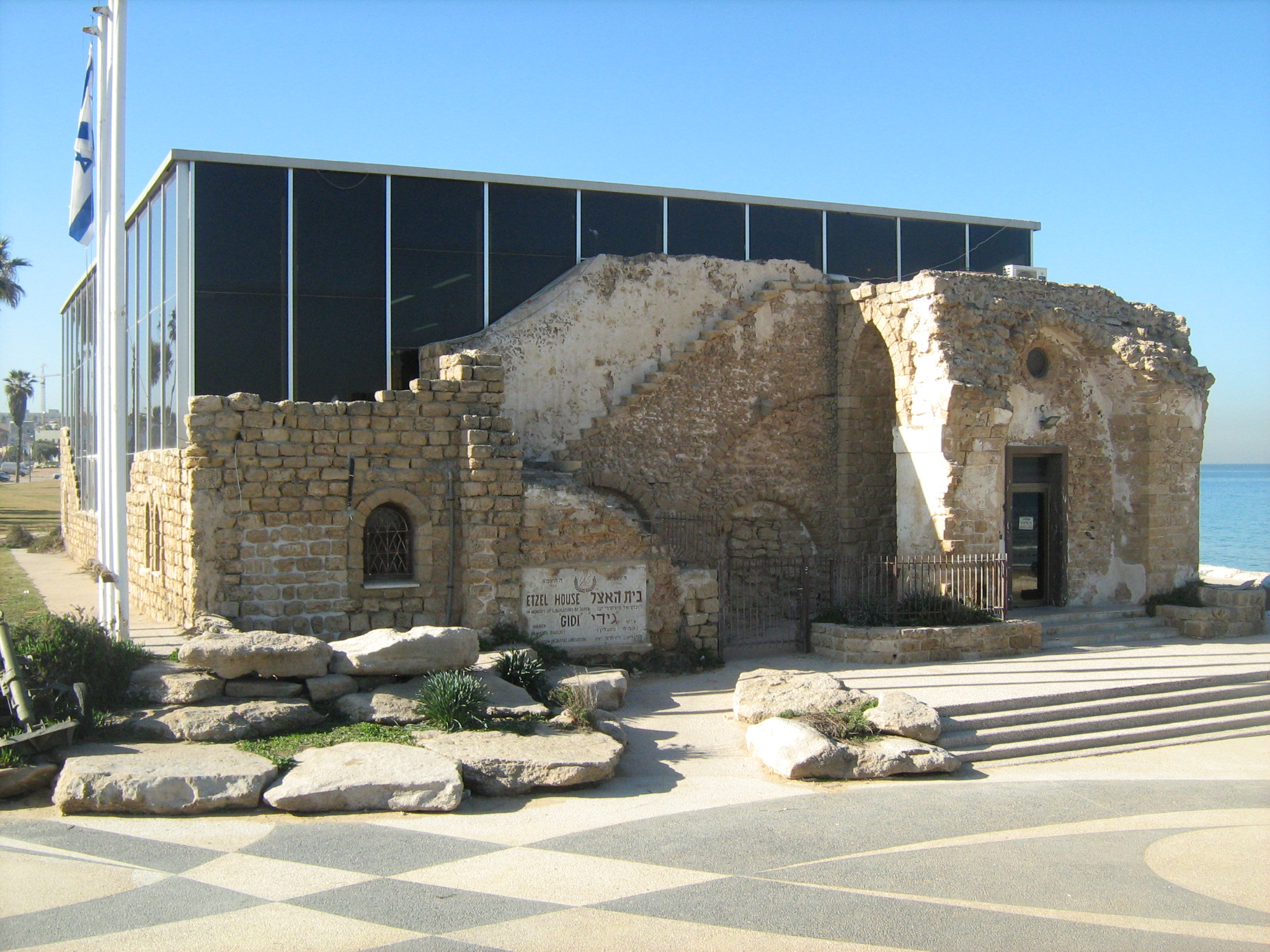 מוזיאון האצ"ל בתש"ח